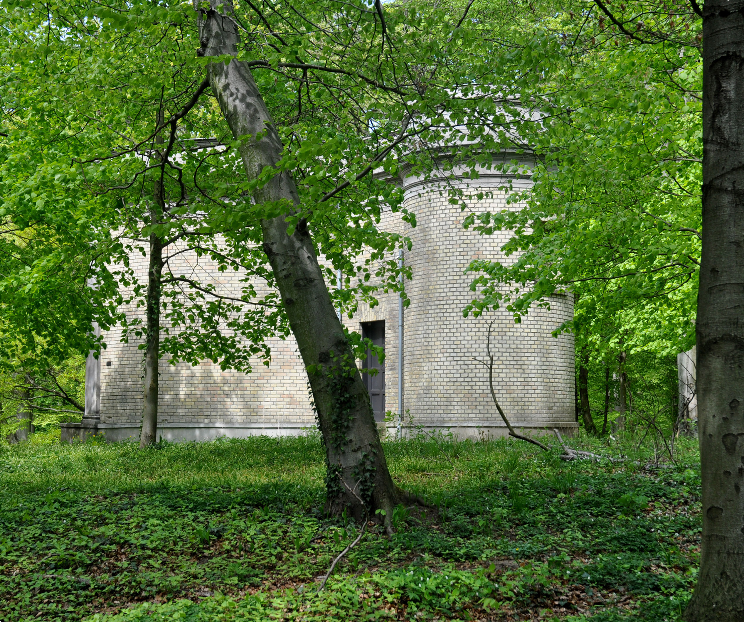 Park Klein-Glienicke, Rückfassade der Loggia Alexandra